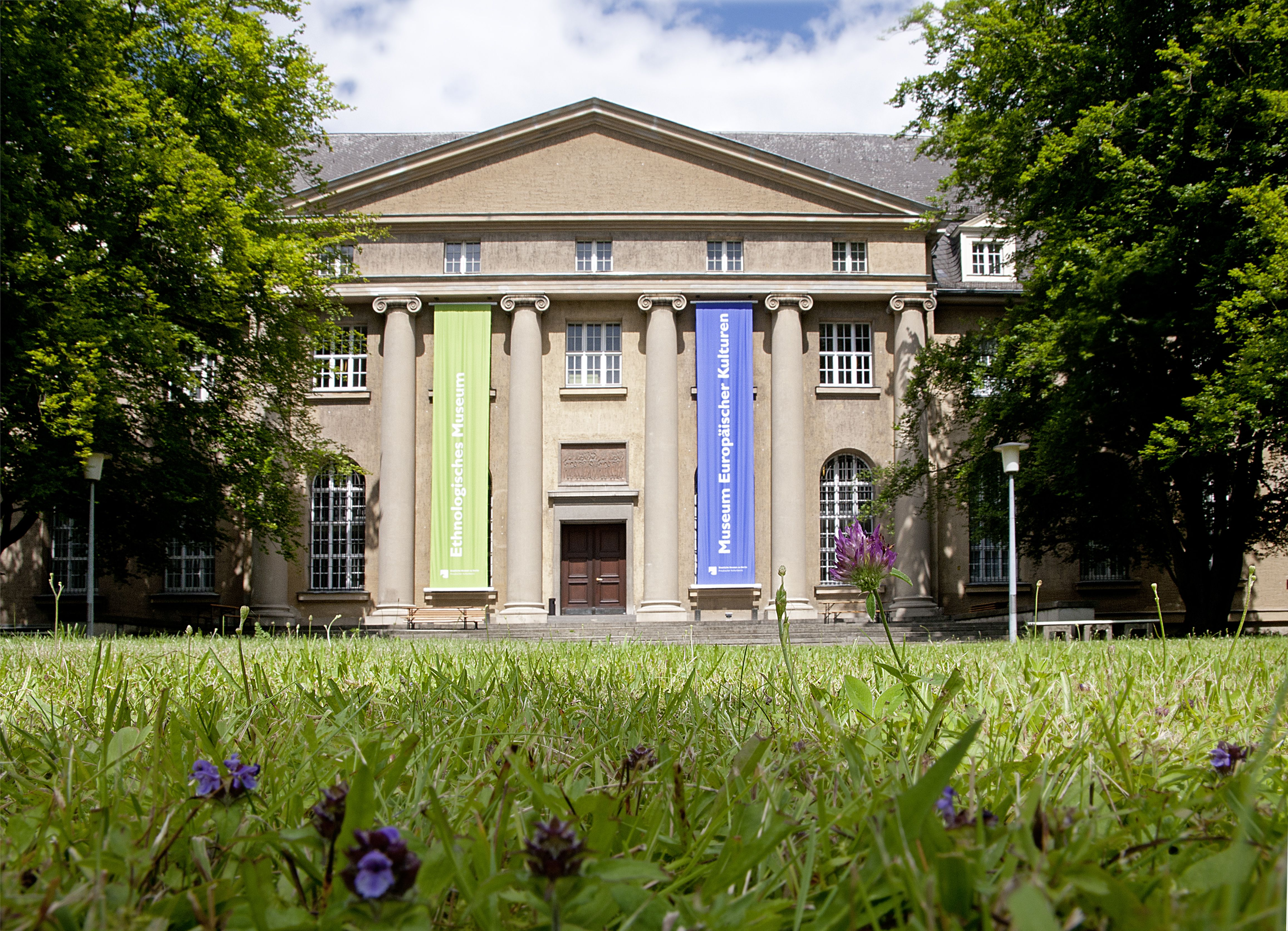 Haupteingang des Museums Europäischer Kulturen in der Arnimallee 25, Berlin-Dahlem.